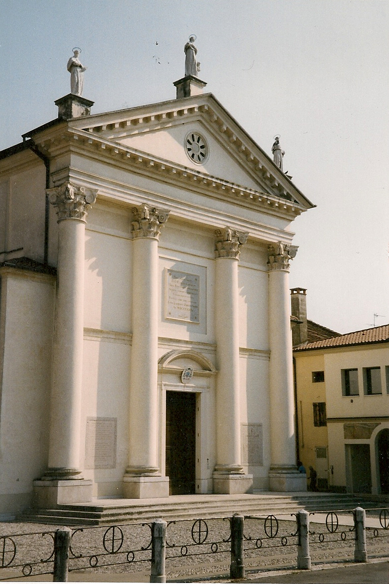 Façade de l'église d'Istrana (Vénétie)